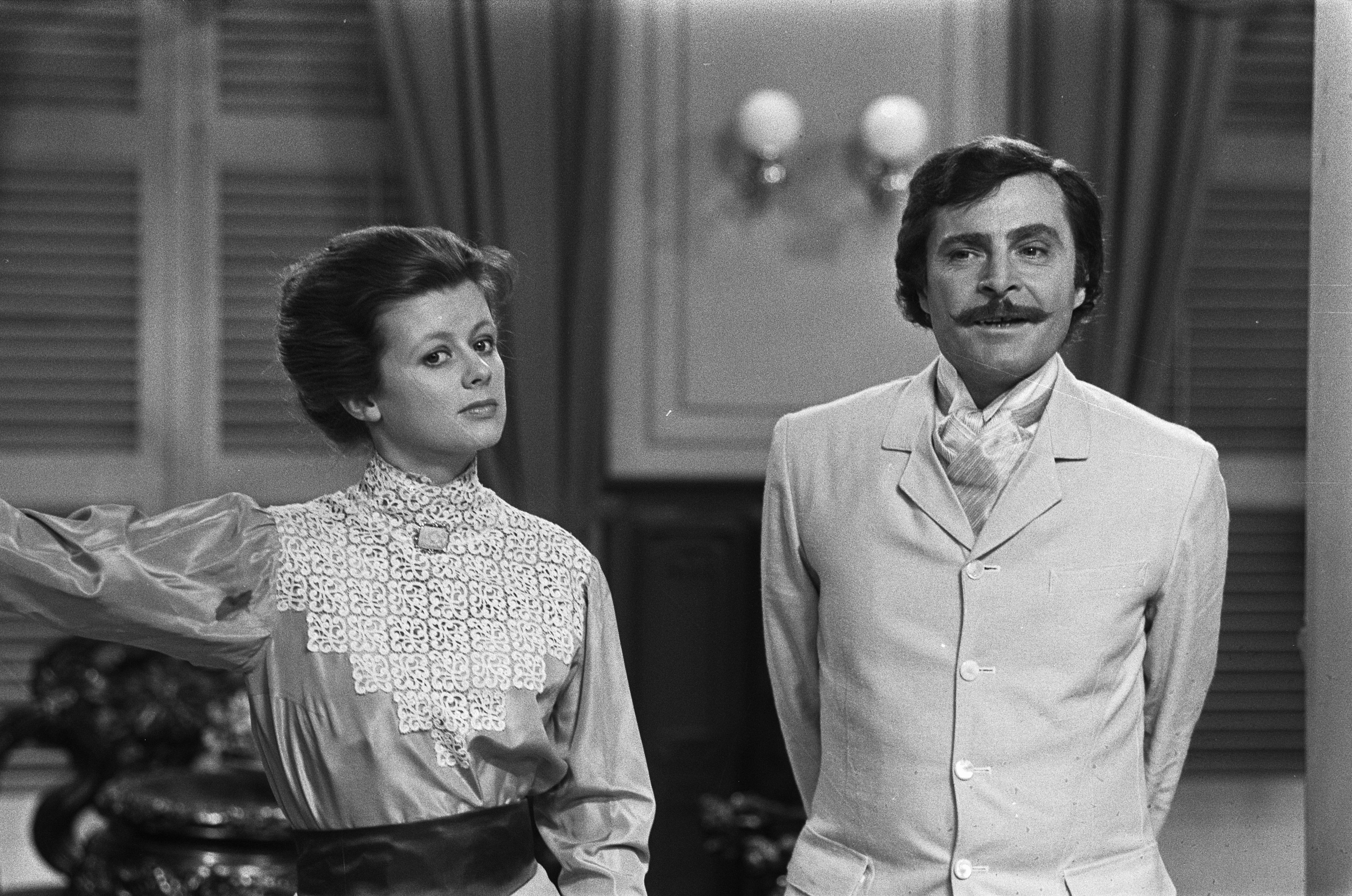 Collectie / Archief : Fotocollectie Anefo Reportage / Serie : [ onbekend ] Beschrijving : TV-spel De Stille Kracht (AVRO), Petra Laseur en Ton Kuyl Datum : 4 januari 1973 Trefwoorden : TV-spellen Persoonsnaam : Kuyl, Ton, Laseur, Petra Fotograaf : Punt, […] / Anefo Auteursrechthebbende : Nationaal Archief Materiaalsoort : Negatief (zwart/wit) Nummer archiefinventaris : bekijk toegang 2.24.01.05 Bestanddeelnummer : 926-1359